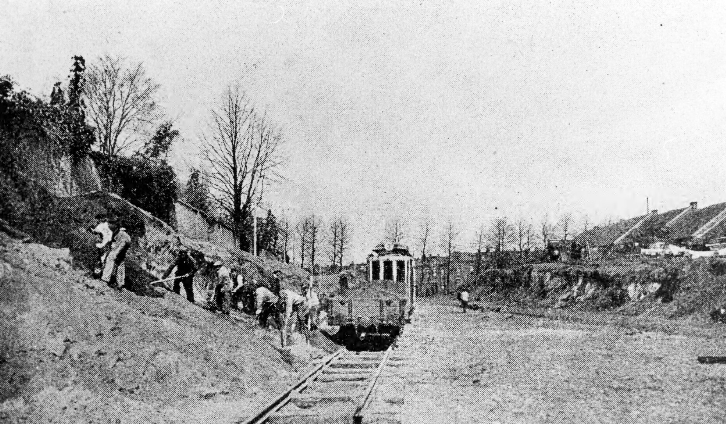 Een motorwagen van de Arnhemse tram wordt in 1918 gebruikt voor het grootschalige zandtransport in Arnhem. Vervaardiger onbekend. Gelet op artikel 38 van de Auteurswet 1912 en de nadere invulling daarvan zoals verduidelijkt onder punt 1.1.5.12 van de Juridische wegwijzer archieven en musea online en de discussie hier is het auteursrecht op deze afbeelding vervallen vanaf 1 januari 1989.